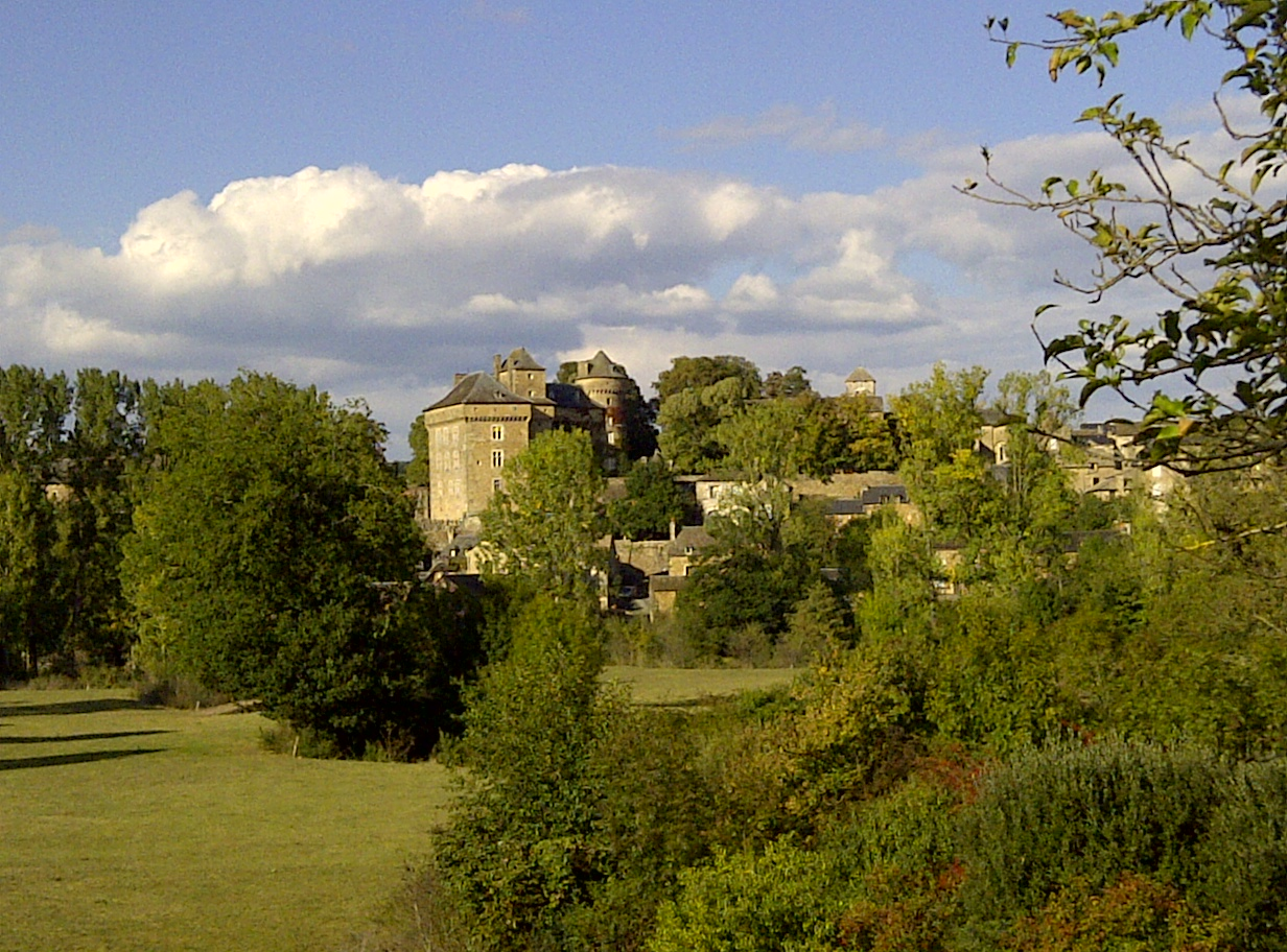 Photo de Montrozier 12630